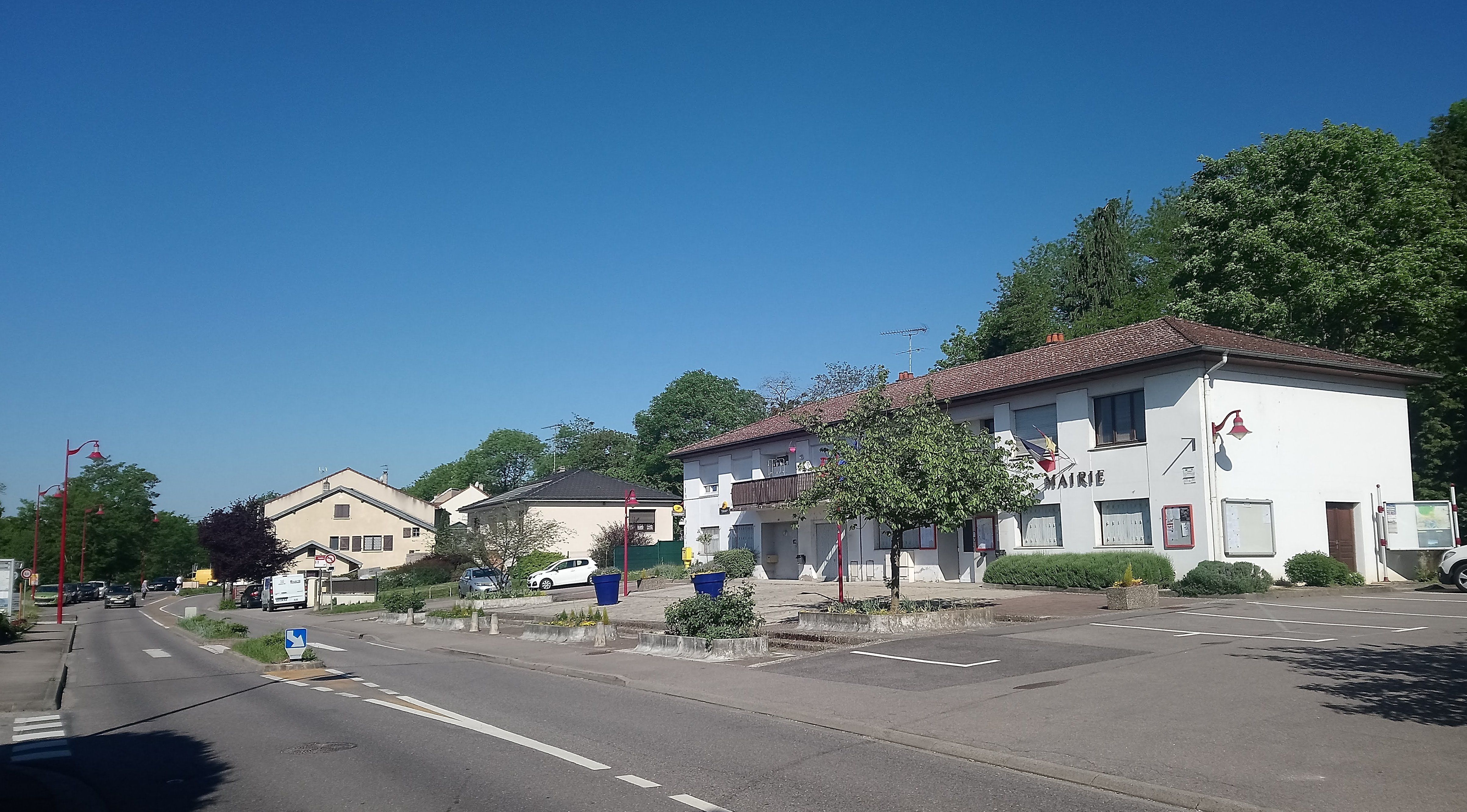 Mairie du village de Messein en Meurthe-et-Moselle